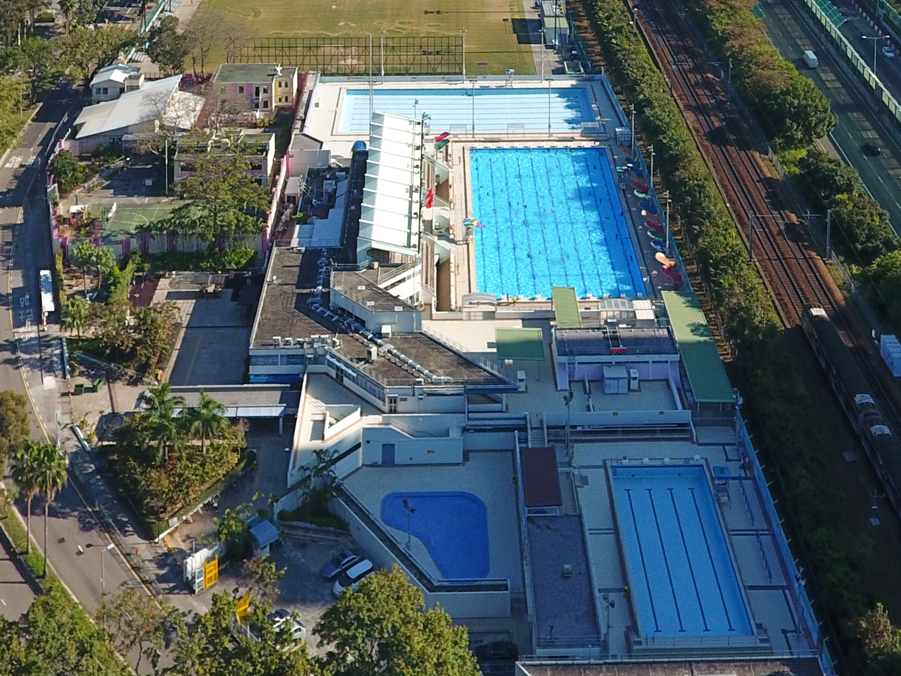 Fanling Swimming Pool